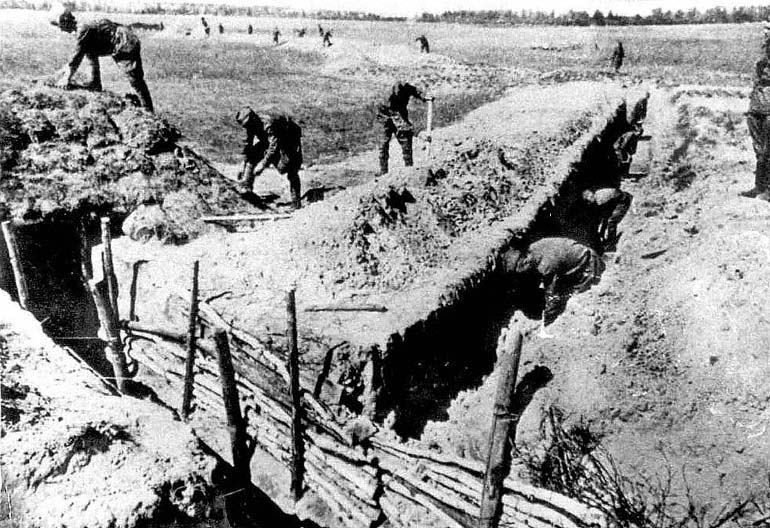 Возведение оборонительных укреплений (окрестности Таллина, июль 1941 г.)